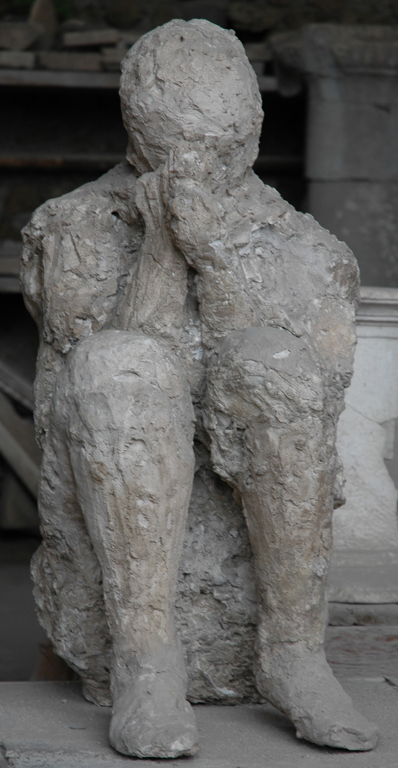 Pompéi : moulage en plâtre d'un homme Cliché : Jean-François BOTTON - Avril 2005